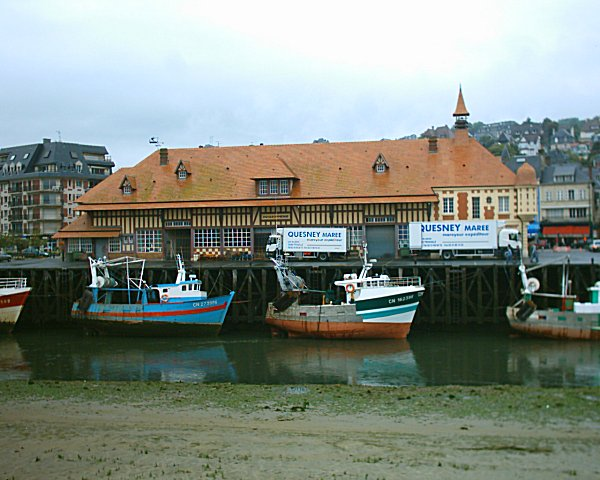 Port de Trouville-sur-Mer, Port de Trouville-sur-Mer.